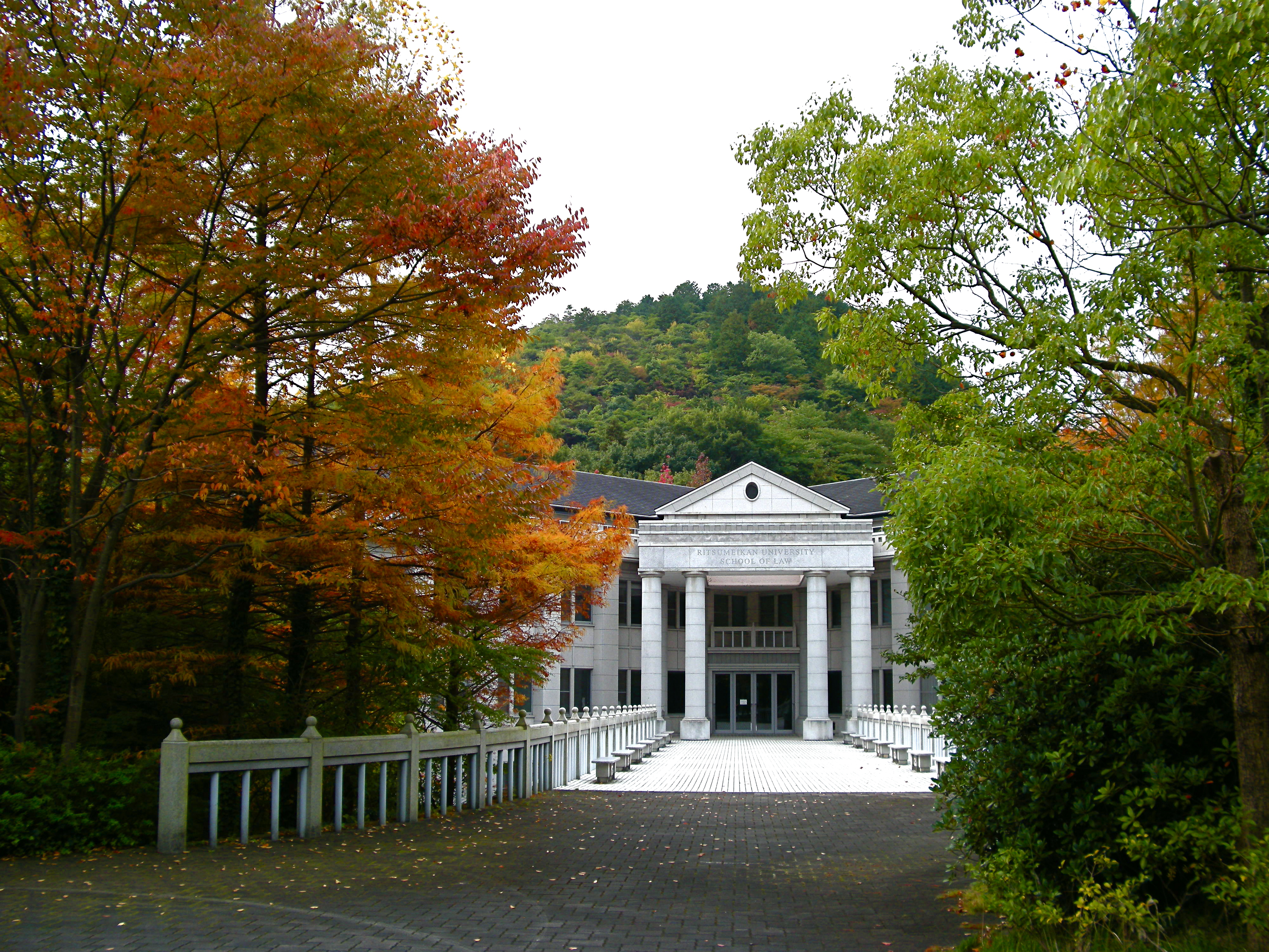 Saionji Memorial Hall at Kinugasa Campus (Kinugasa Campus, Ritsumeikan University, Kyoto, Japan)